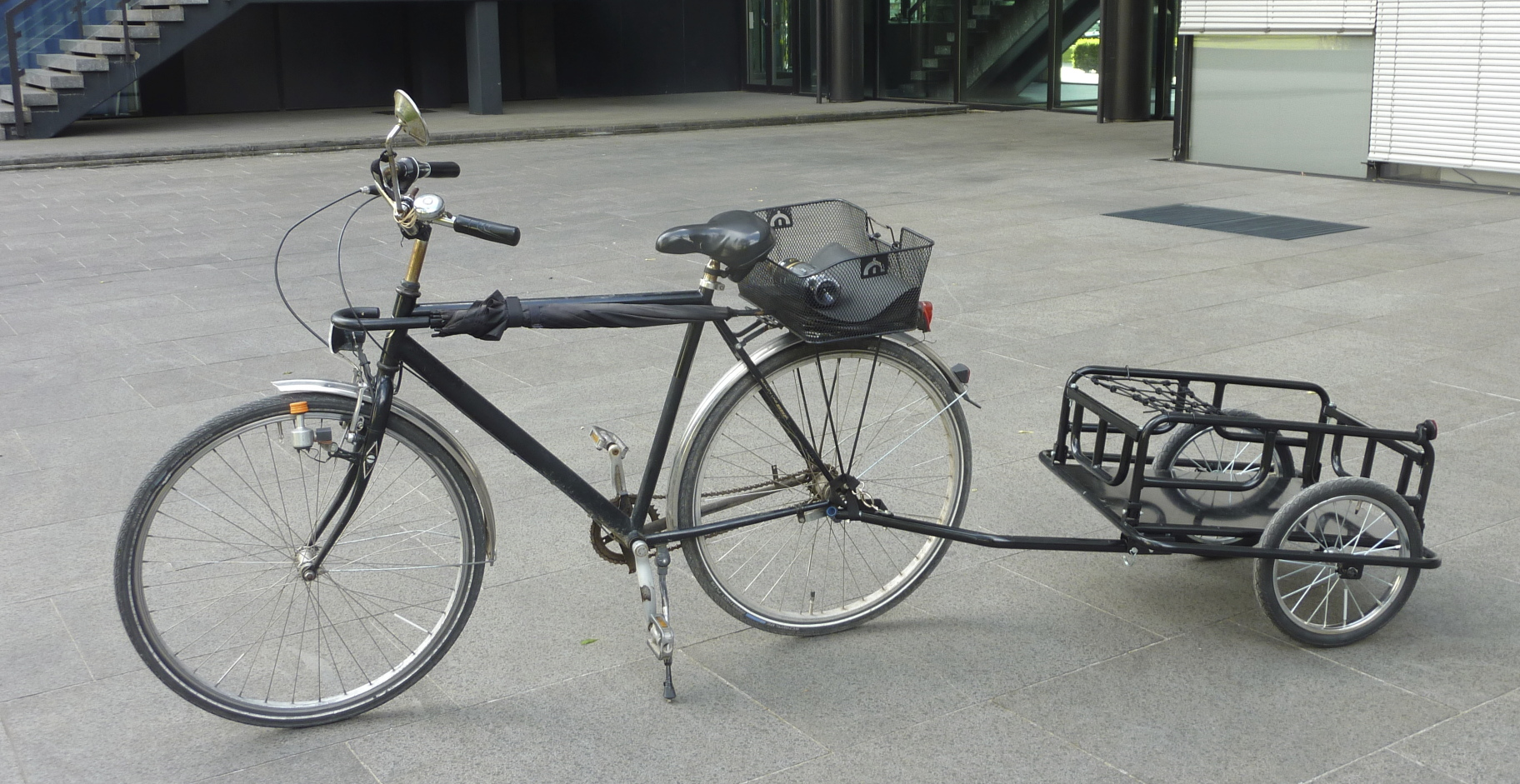 Zweirädriger, schwarz lackierter Fahrrad-Lastenanhänger mit Stahlrohr-Rahmen und -Reling und Stahlblech-Ladefläche sowie mit Tiefdeichsel und Rahmen-/Hinterradnaben-Kupplung